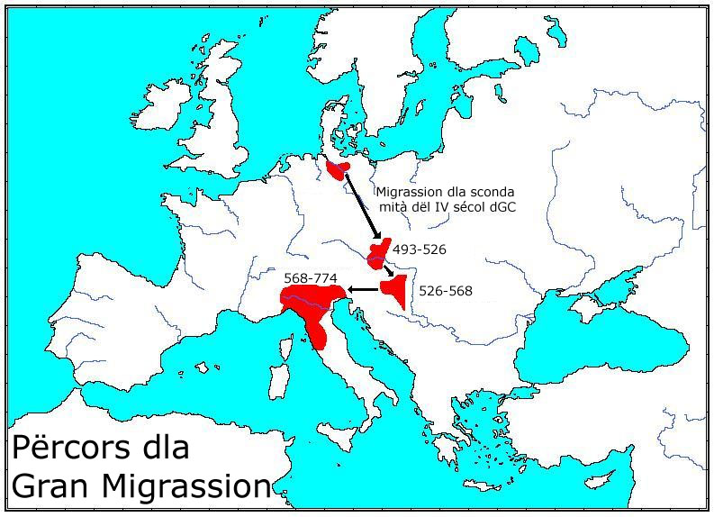 Migrassion dij Longobard Lombard migrations